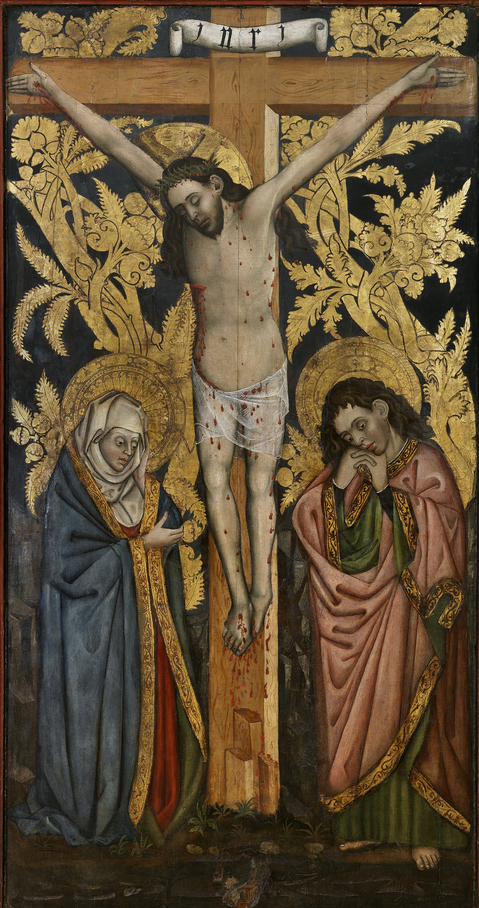 La obra representa a Jesucristo crucificado en el monte Calvario y acompañado por su madre, la Virgen María, y por San Juan Evangelista.